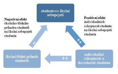 Na grafu č. 1 můžeme vidět vztah mezi základními složkami, které ovlivňují školní sebepojetí studenta. Vstupují zde do vztahu individuální schopnosti a dovednosti studenta, které pozitivně působí na školní průměr třídy a školy, zároveň pozitivně působí i na školní sebepojetí studenta. Dále je zde školní průměr třídy/školy, který negativně působí na studentovo školní sebepojetí.